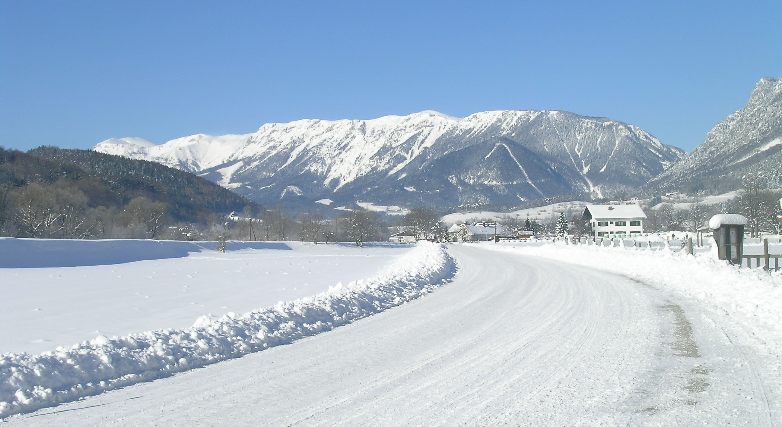 Beschreibung:Rax in Niederösterreich Quelle: selbst erstellt Fotograf: gaucho Copyright Status: GNU-FDL Freie Dokumentationslizenz